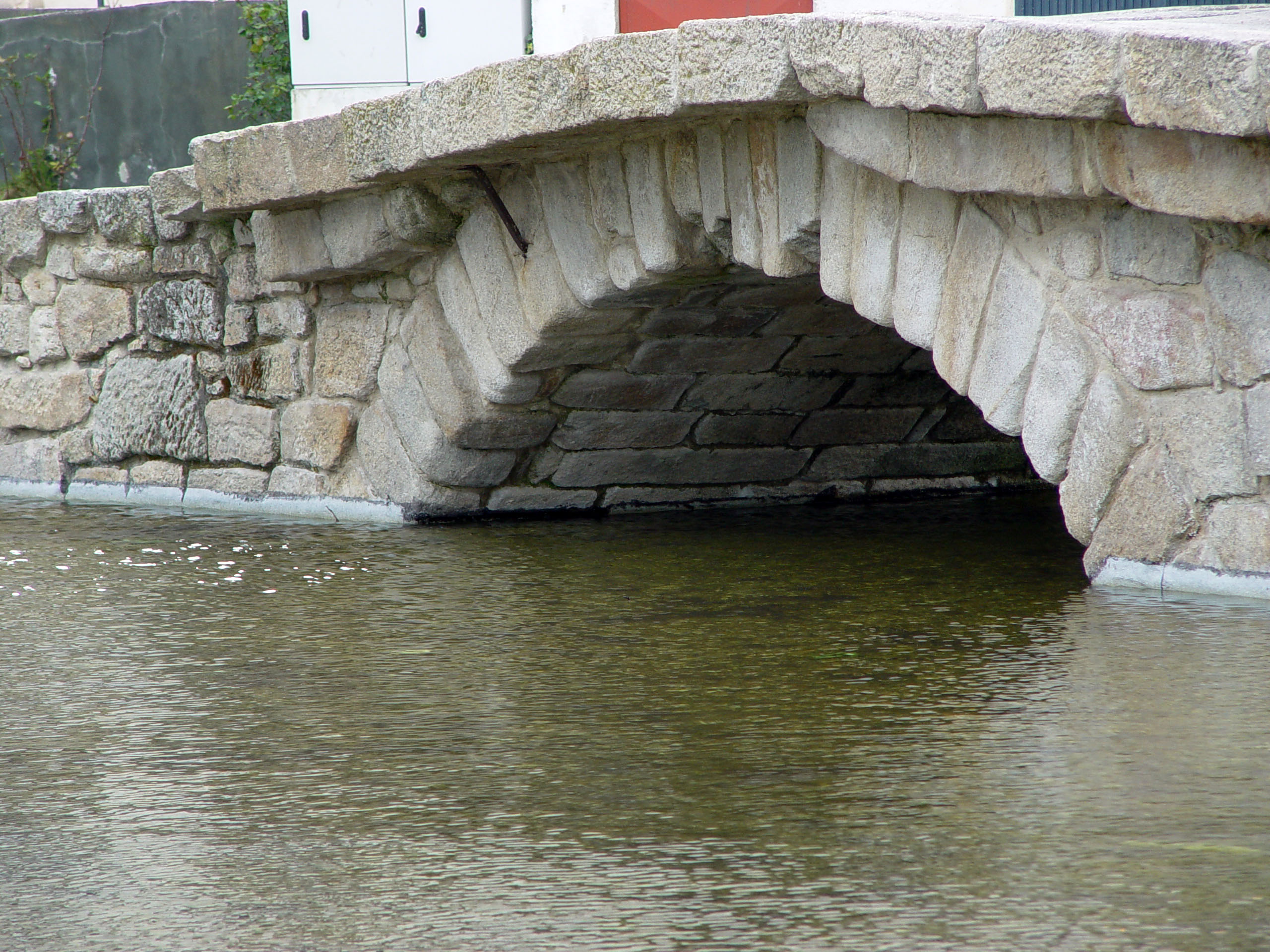 Termas Romanas de Chaves ou Termas Medicinais Romanas de Chaves This file was uploaded for Wiki Loves Monuments in Portugal with the unique identifier 13214032.